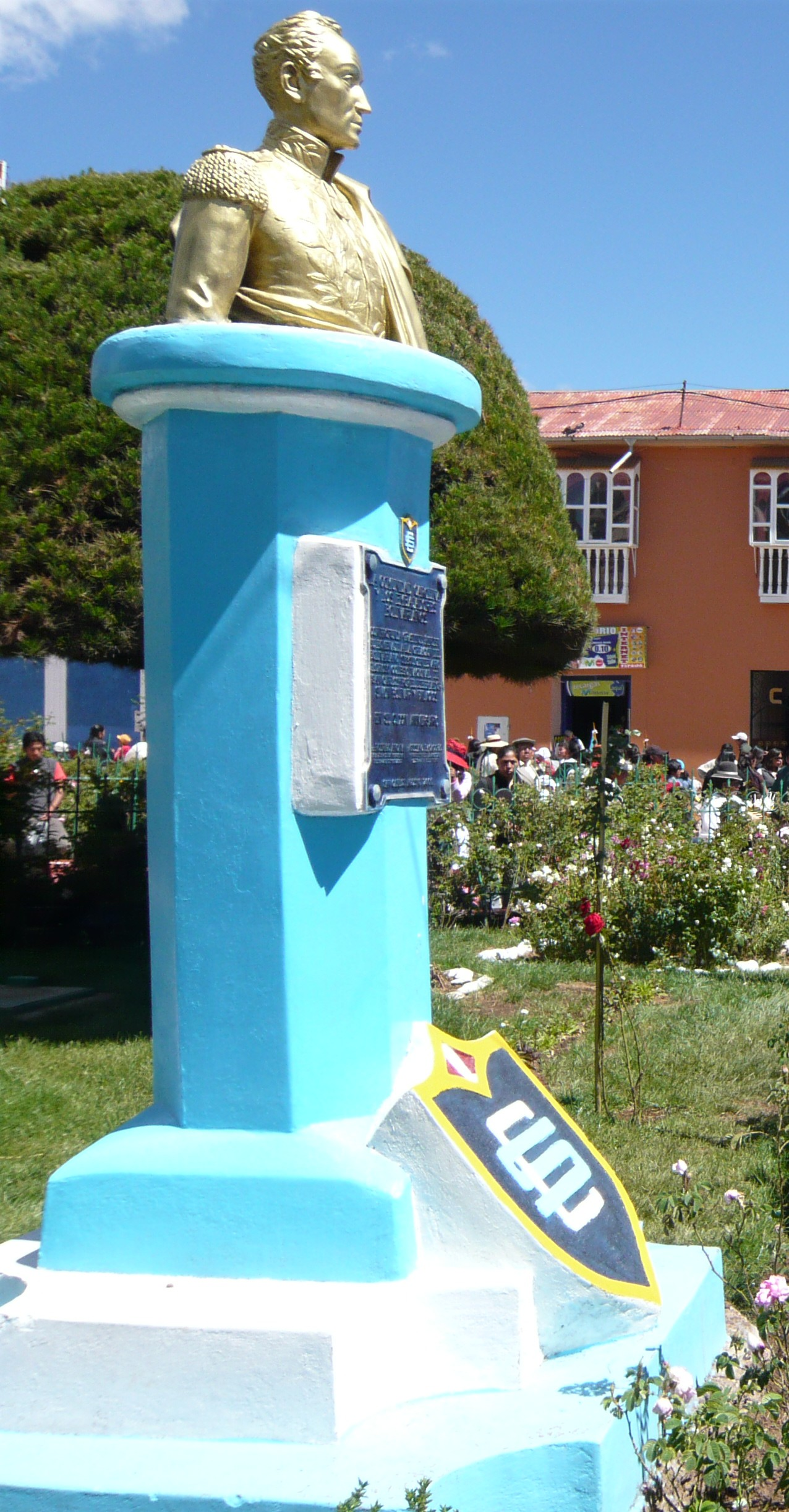 Monumento del fundador del Glorioso Colegio Nacional de San Carlos